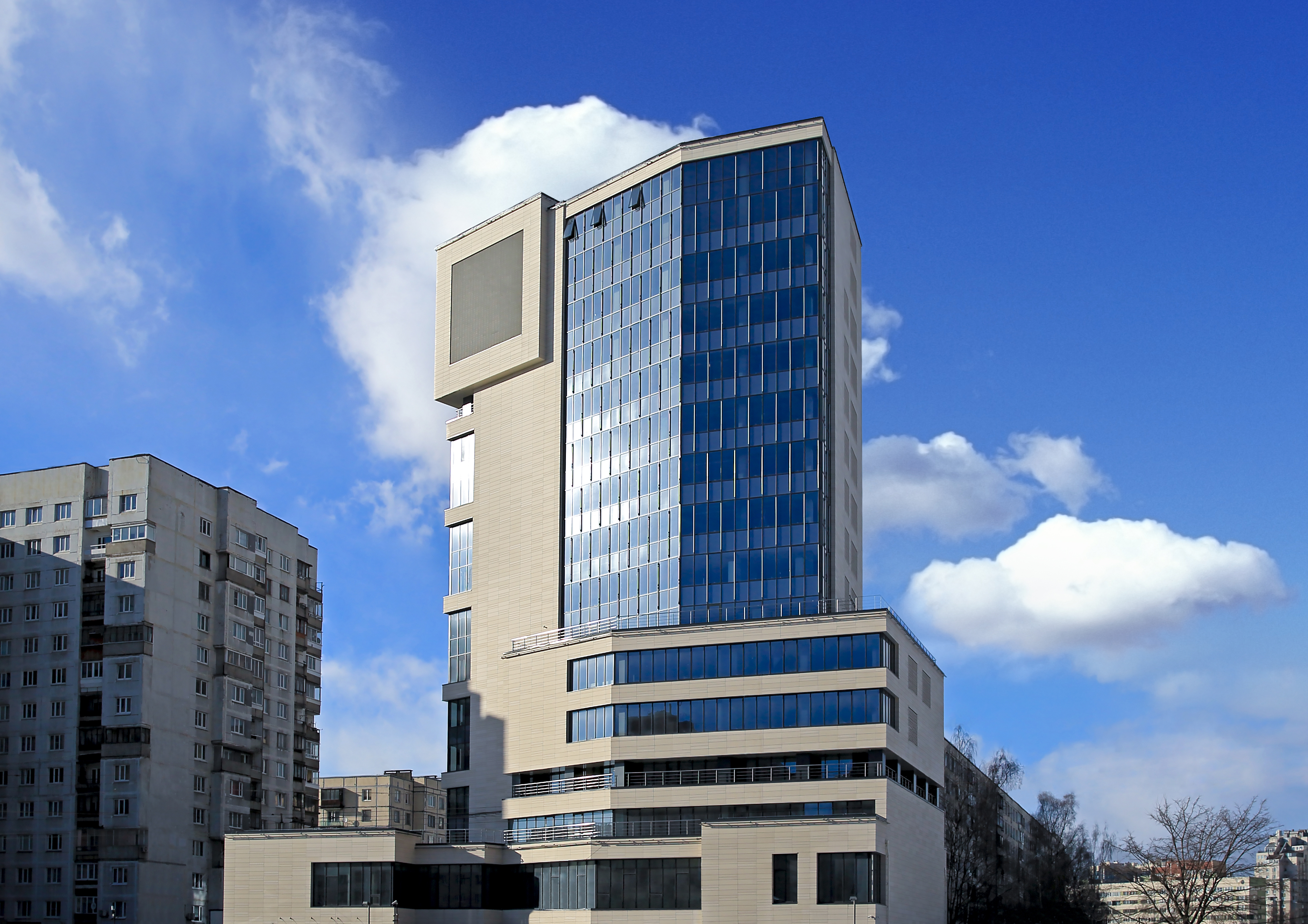 Центральный офис Группы "Эталон"